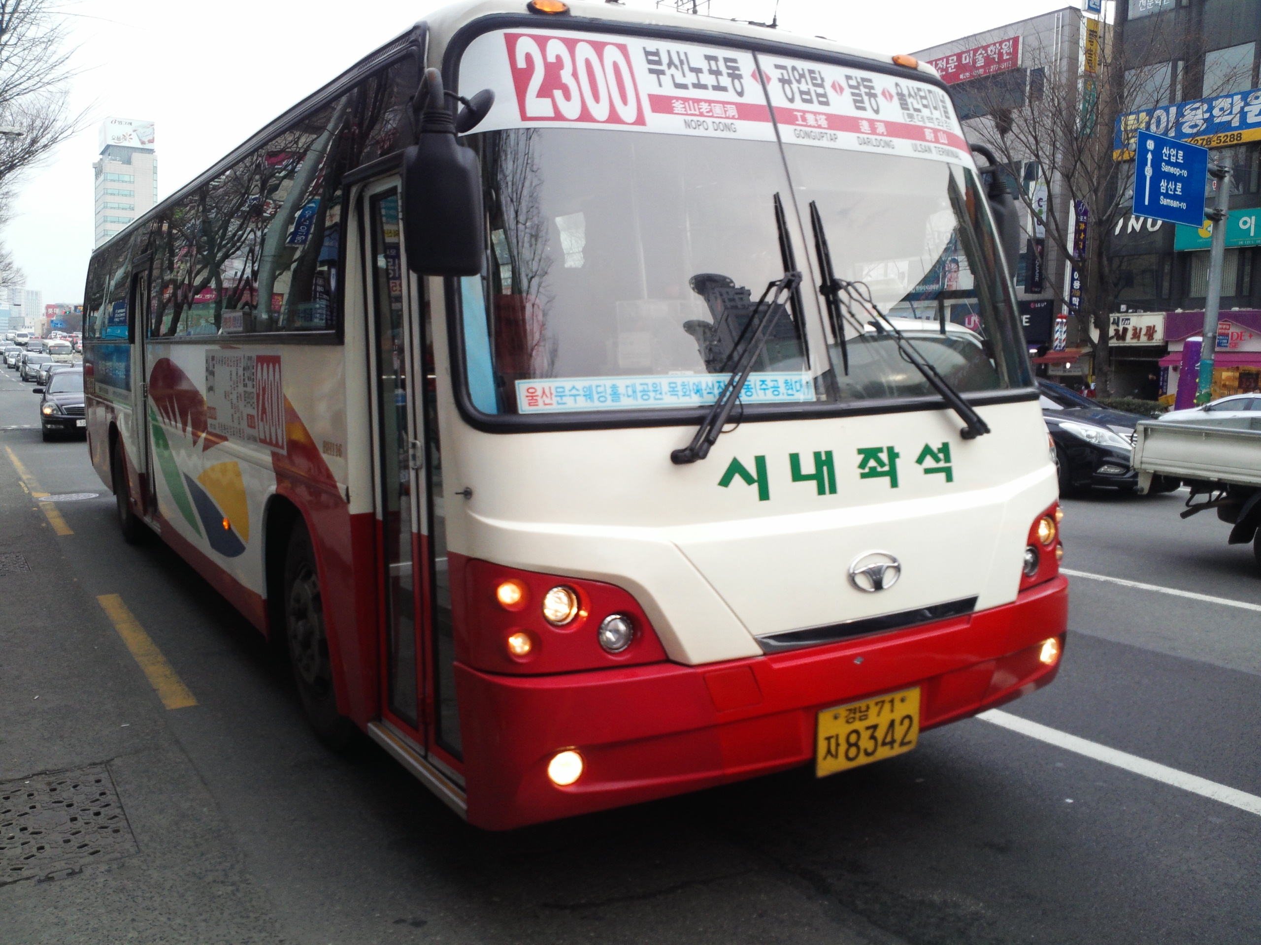 양산 버스기업 푸른교통 소속 양산시내버스 2300번.